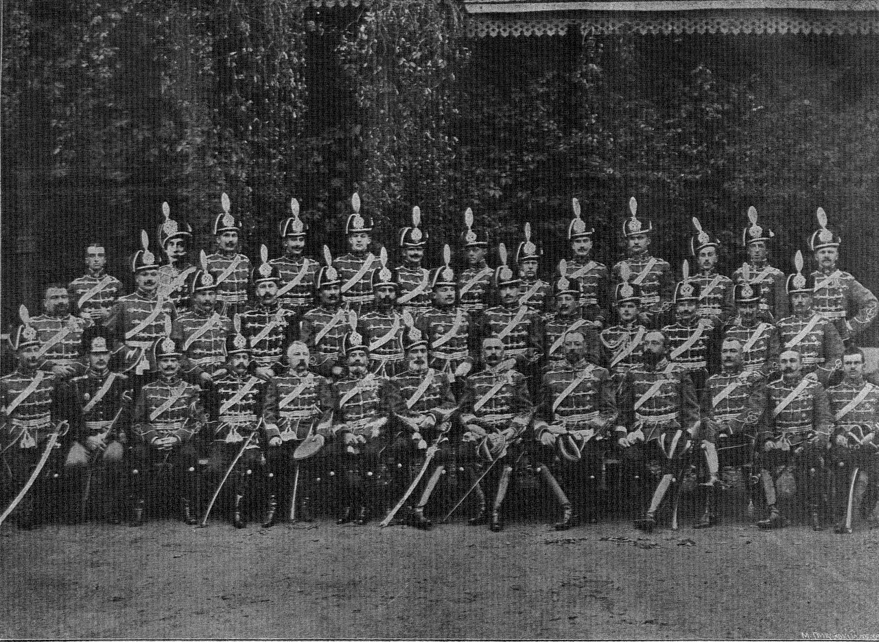 Лубенский 8-й гусарский полк. Группа офицеров полка.